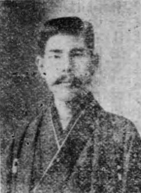 Hidehachi Ishii